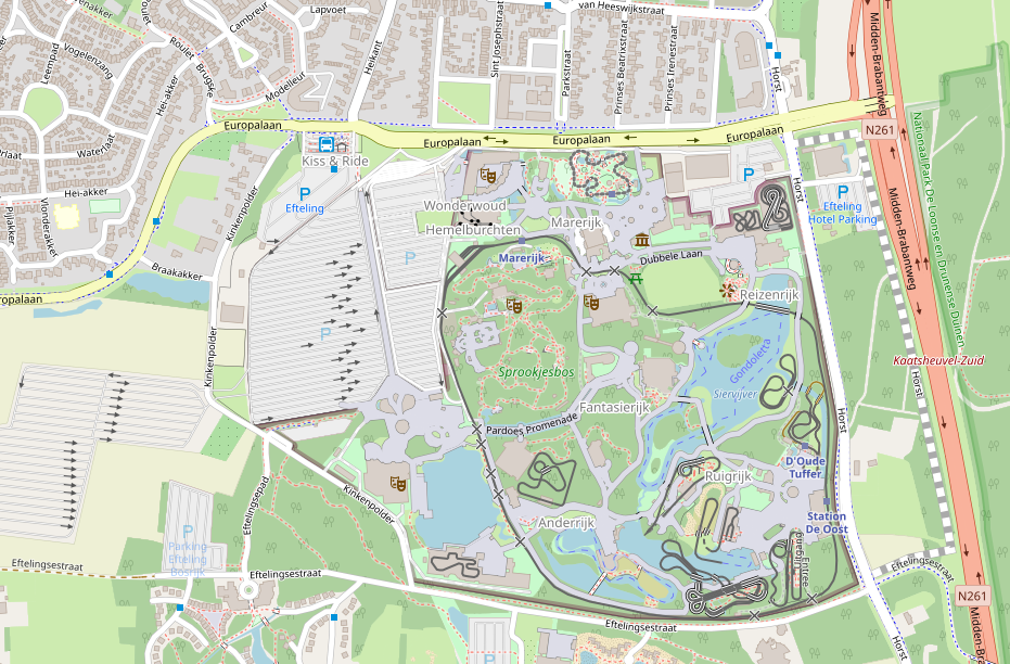 Efteling Stoomtrein Maatschappij (OpenStreetMap)